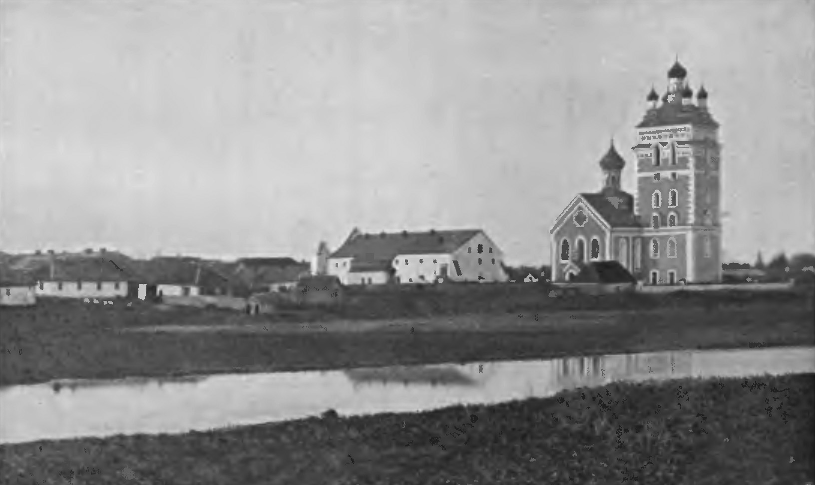 Старокостянтинів. Монастир оо. Домініканців після перебудови на муравйовку.